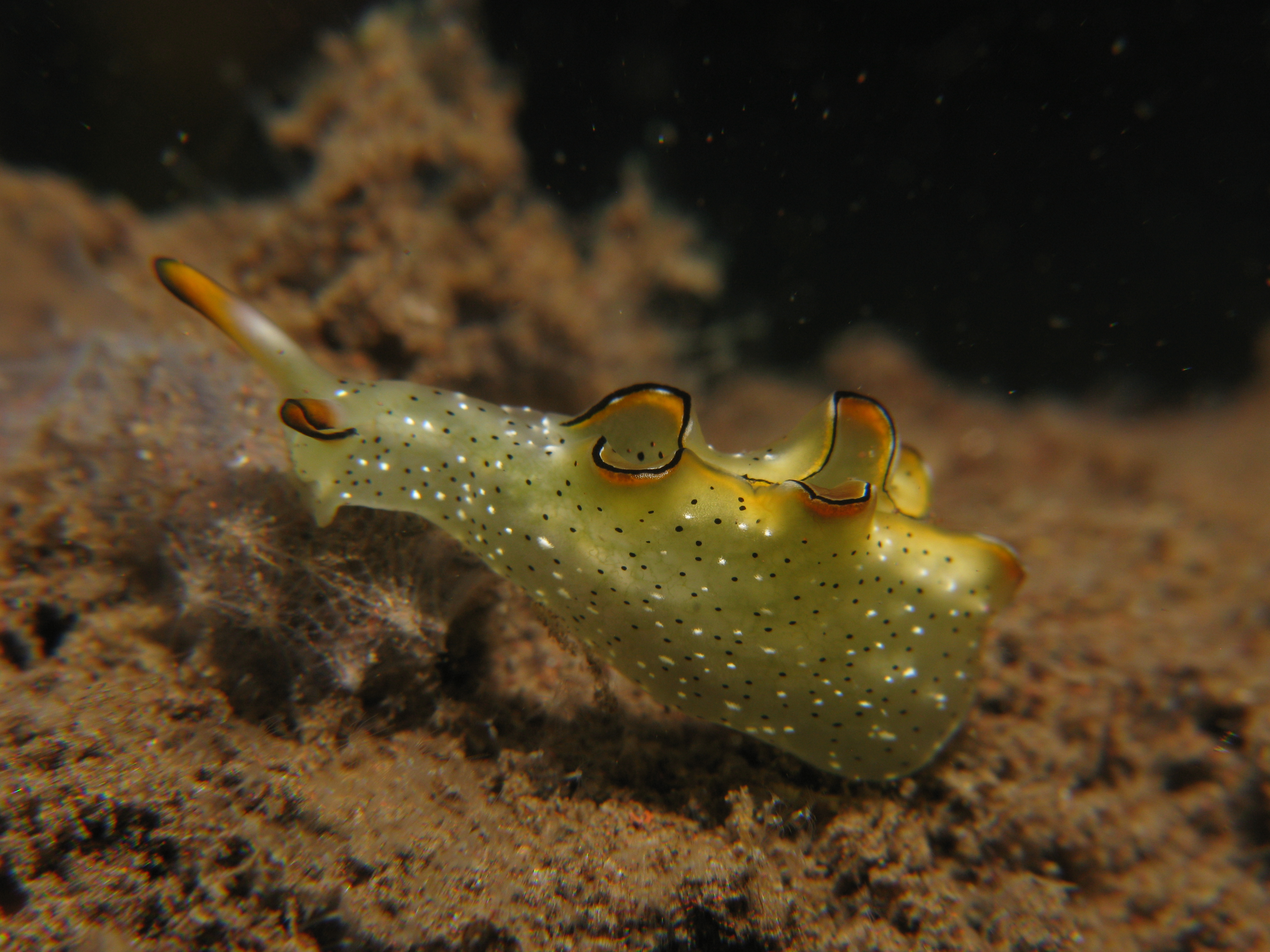 Elysia ornata Nudibranch; Indonesia